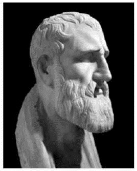 Зенон